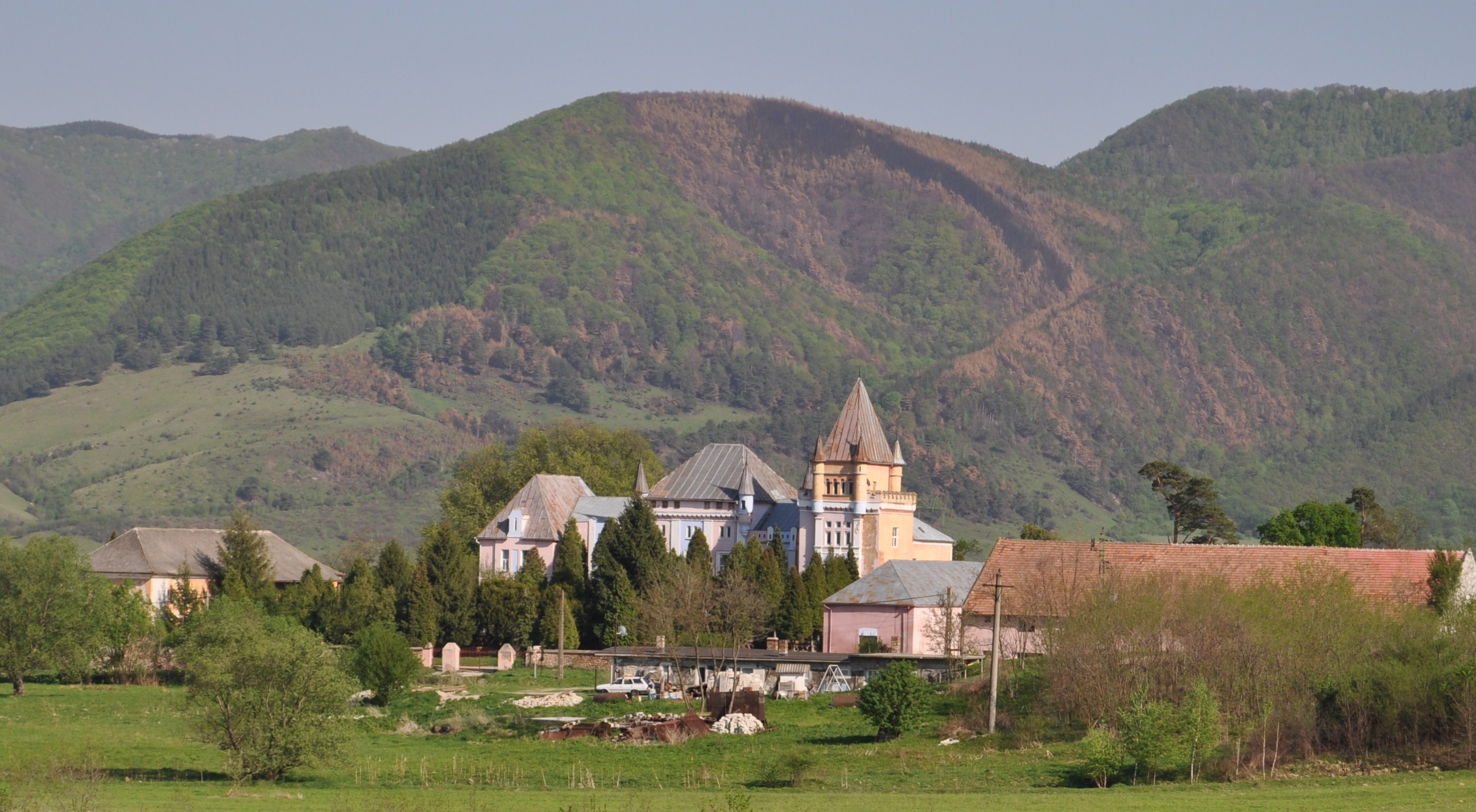 Castelul Kendeffy din Sântămăria-Orlea, județul Hunedoara 01